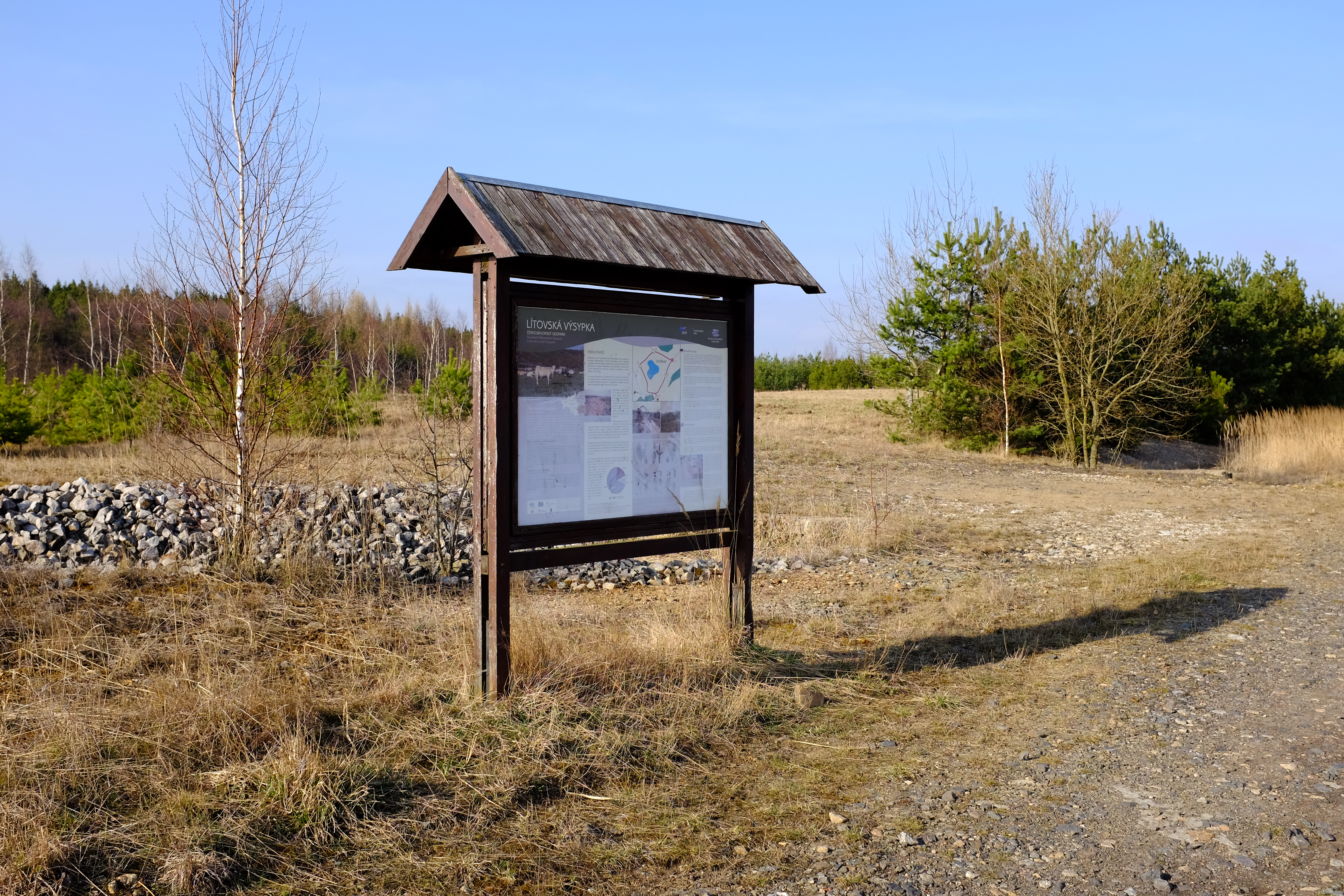 Lítovská výsypka, infopanel Česko-bavorského geoparku, okres Sokolov